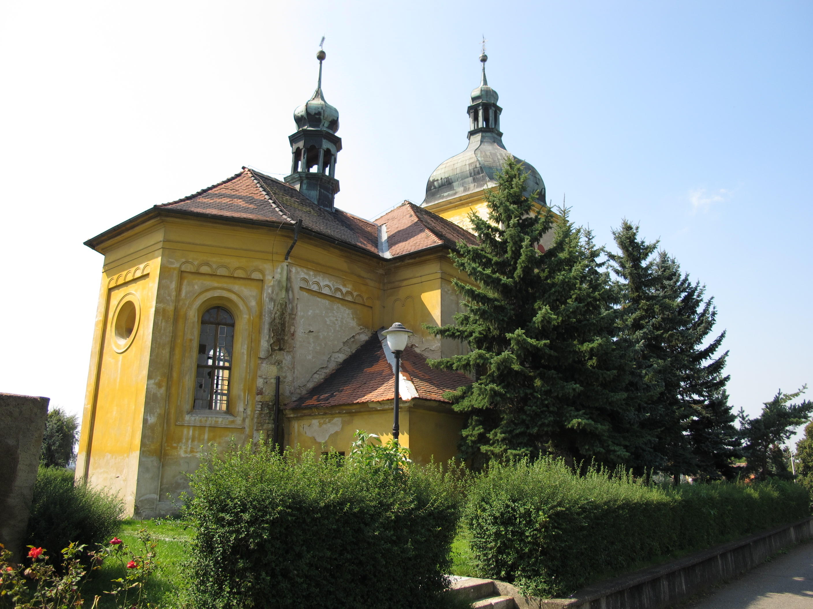 Obec Volevčice, okres Most - kostel sv. Prokopa